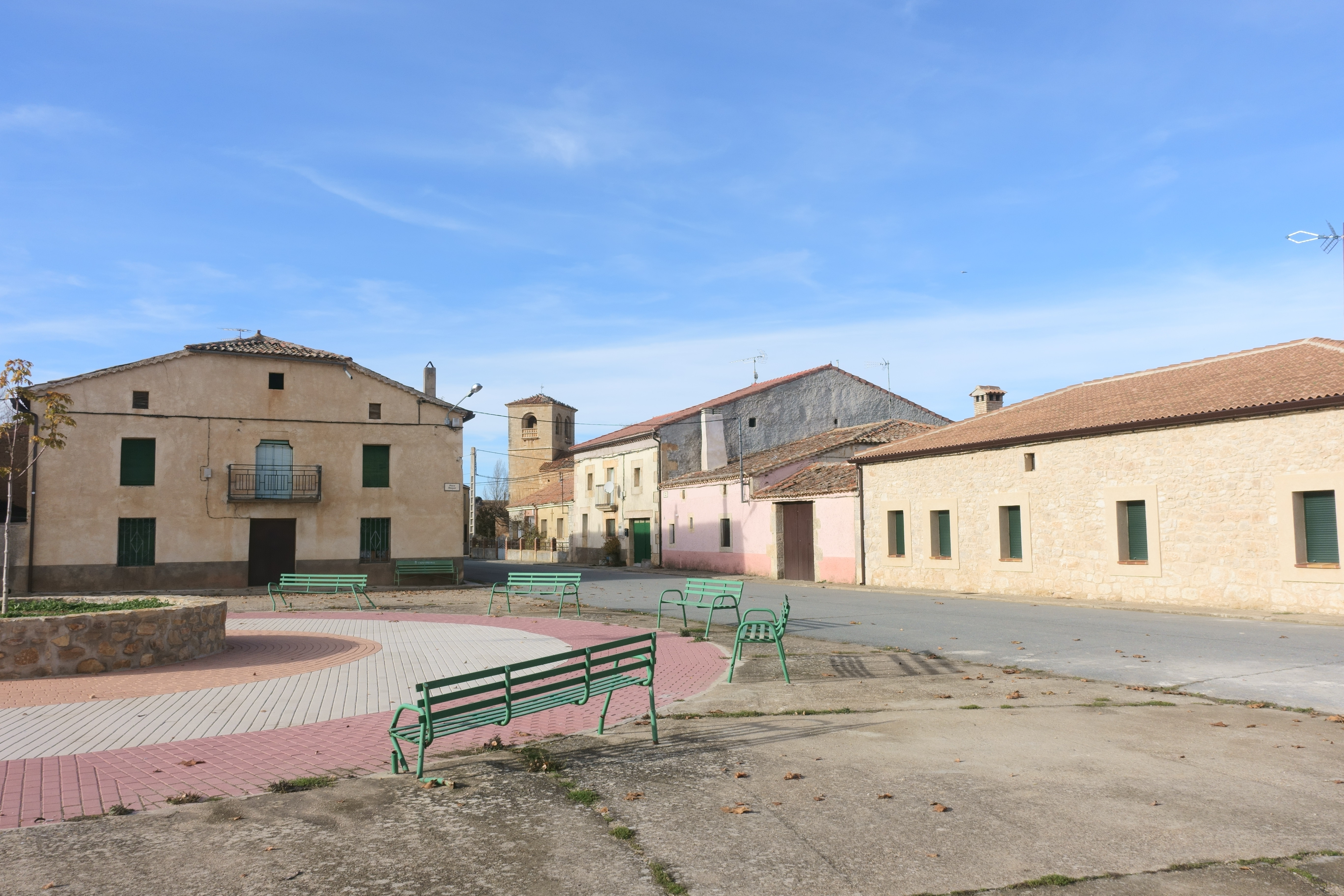 Plaza Mayor en Riaguas de San Bartolomé (Segovia, España).